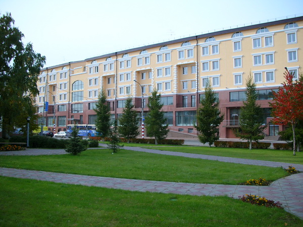 Здание по ул. Ленина, 2-а города Тюмени.